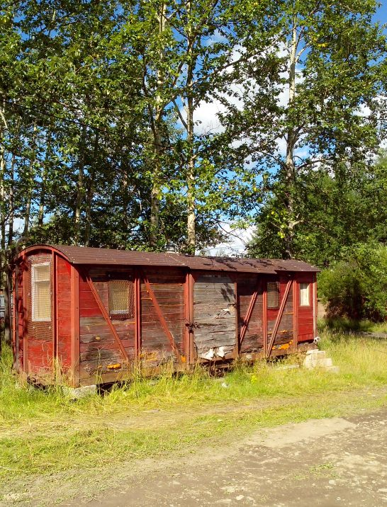 Вагончик, сохранившийся от узкоколейки Магадан-Палатка